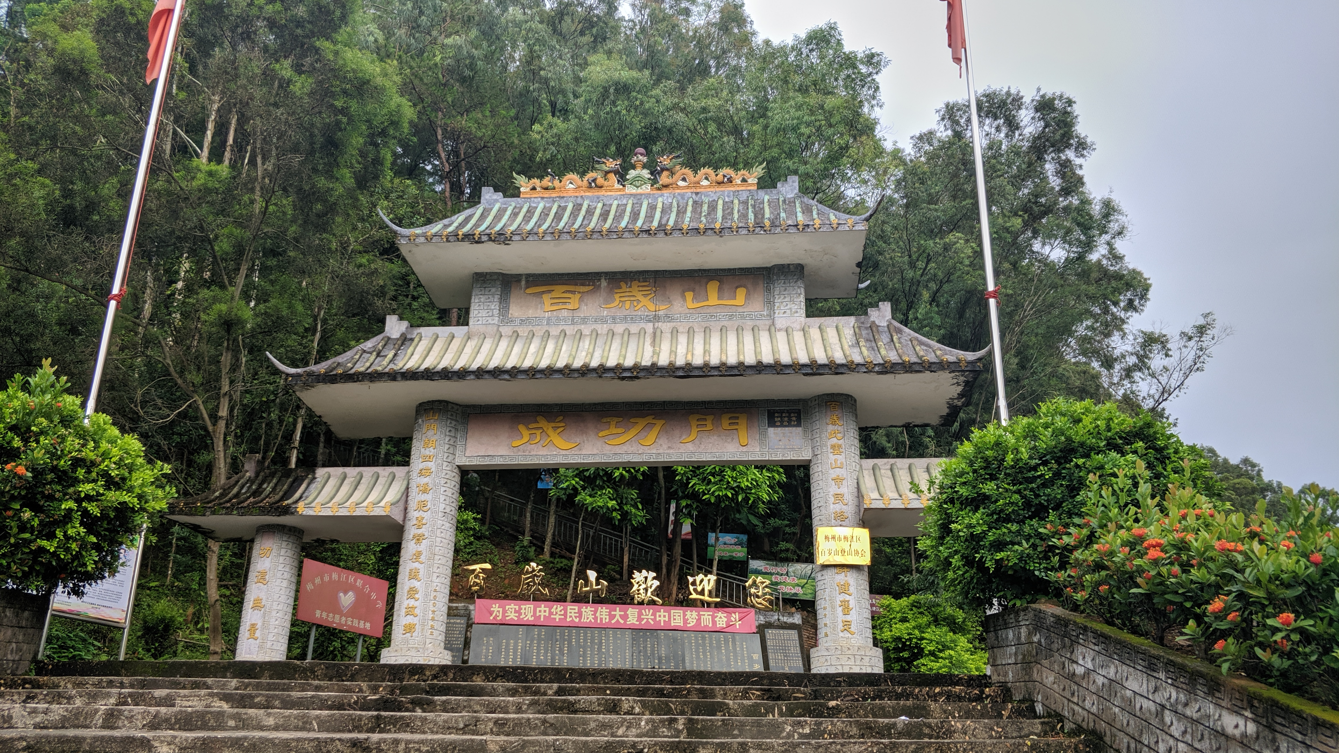 梅州百岁山登山入口正门牌坊